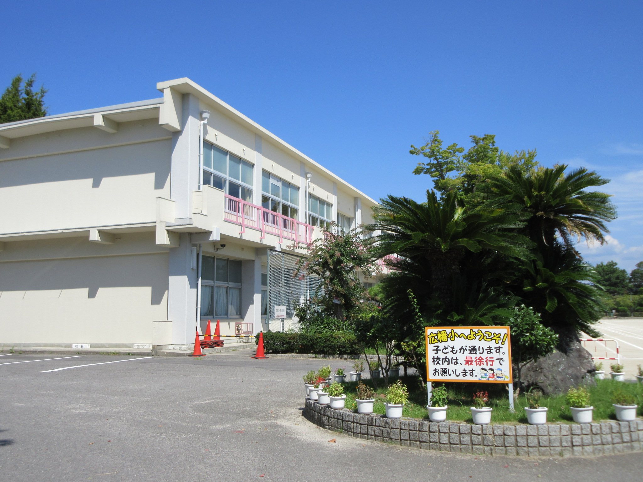 岡崎市立広幡小学校（岡崎市広幡町）